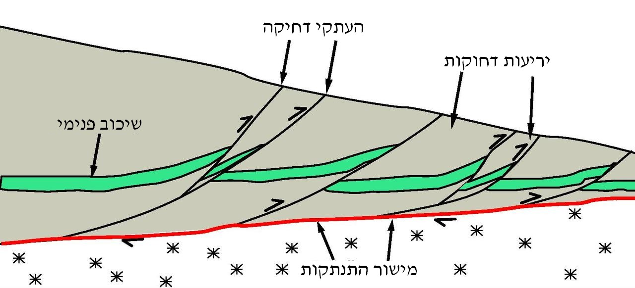 מישור התנתקות